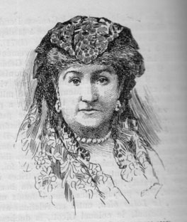 La Duchess de Pomar et Lady Caithness